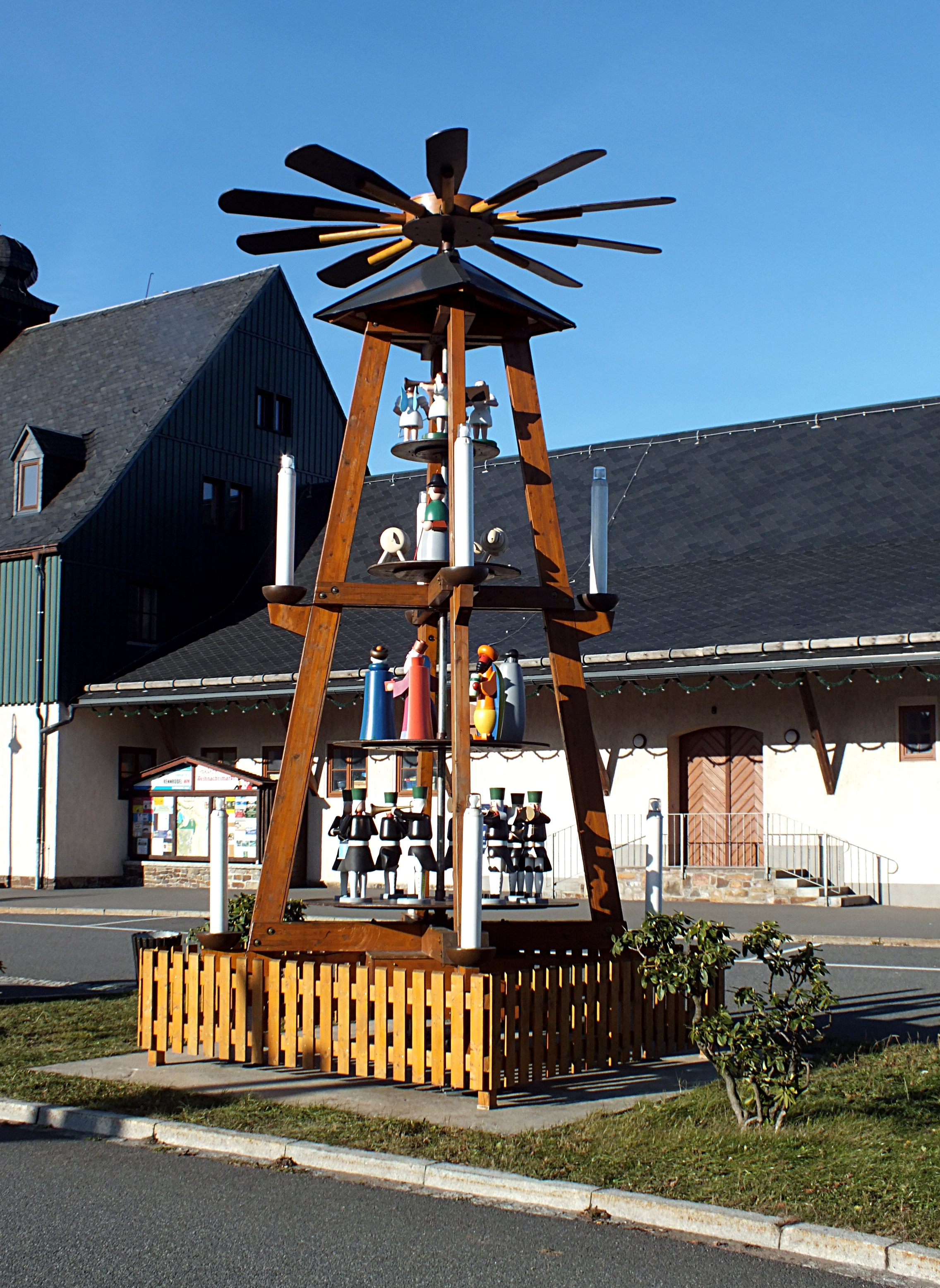 Altenberg, Ortspyramide (1)